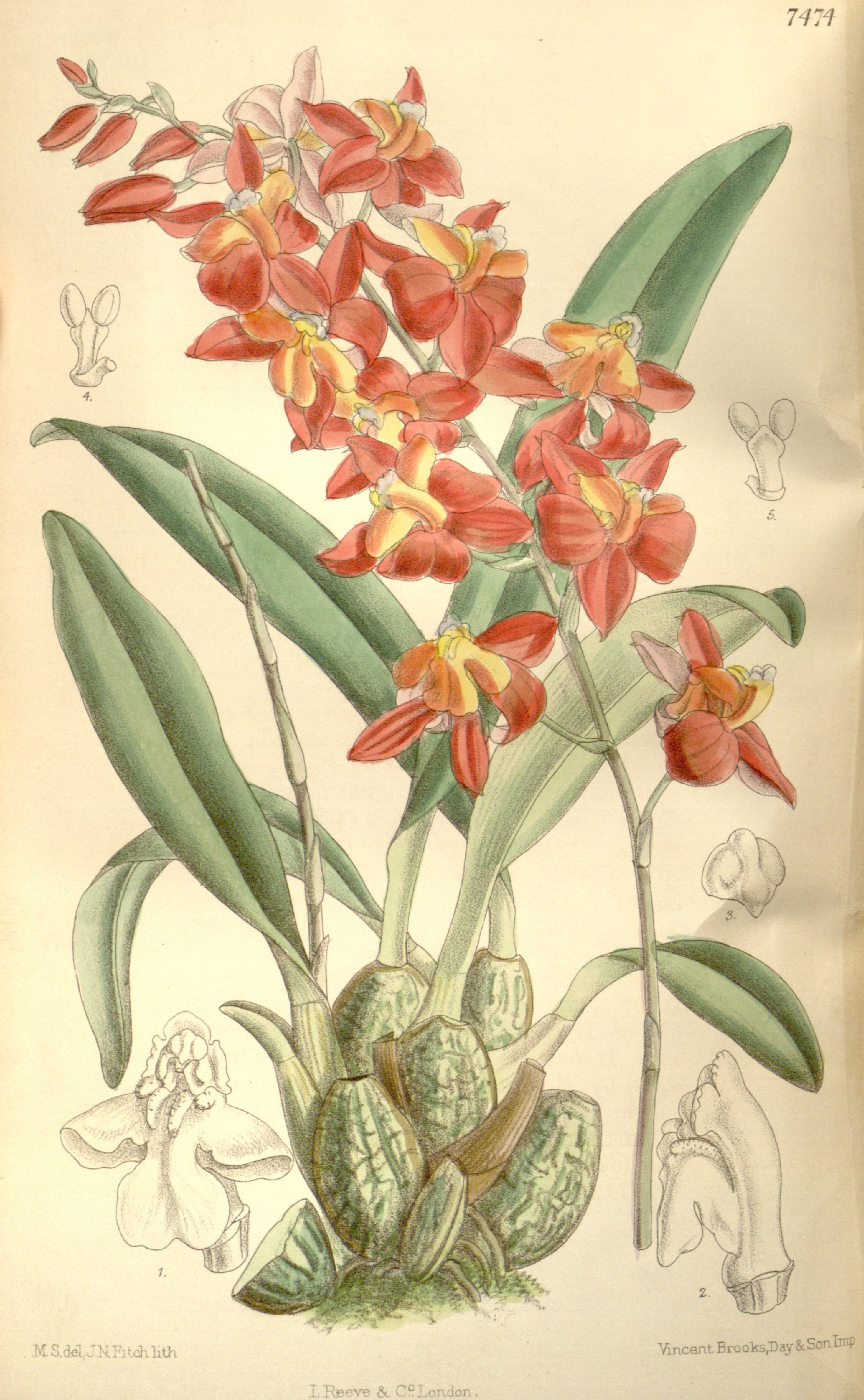 Illustration of Cochlioda noezliana